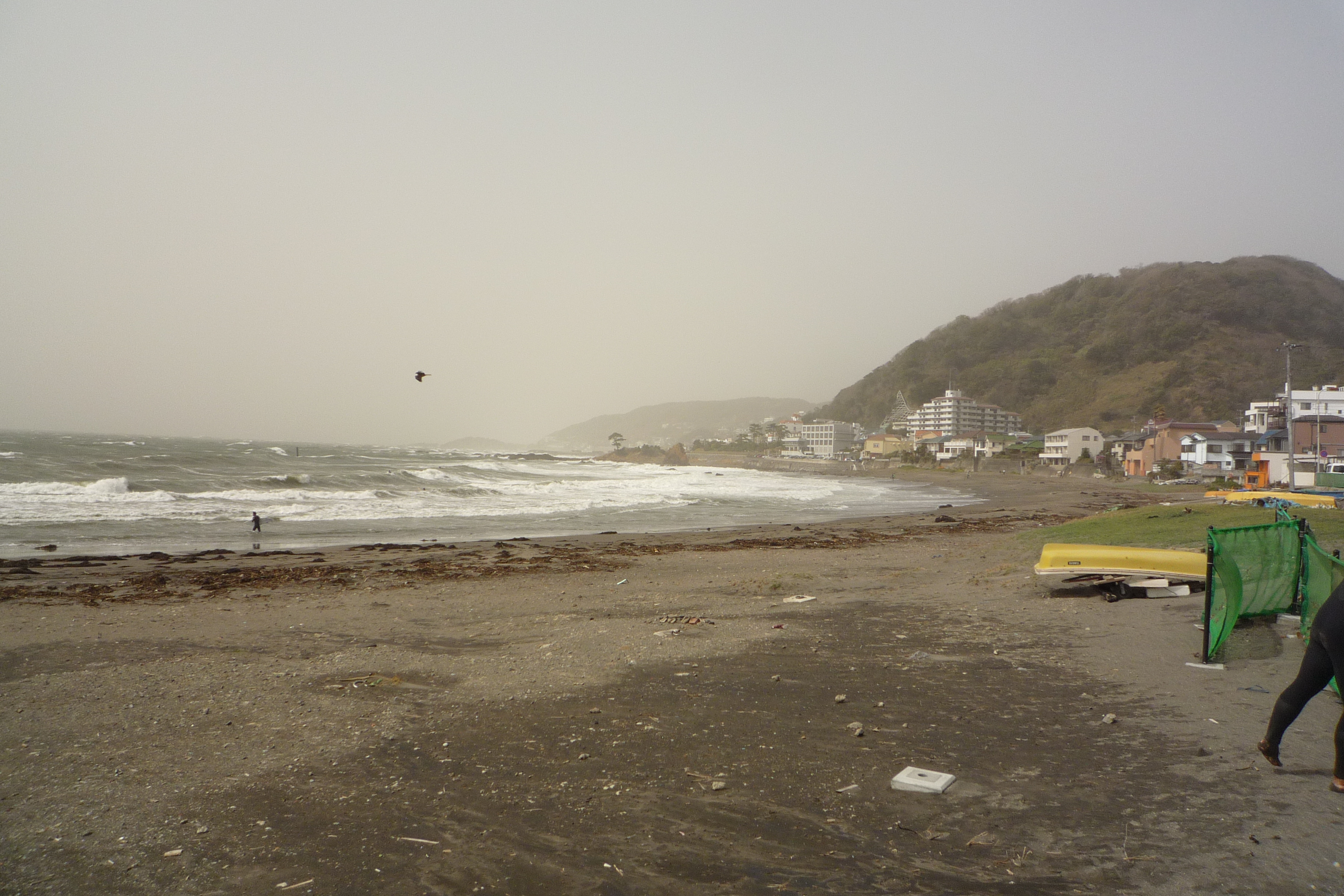 秋谷の砂浜を撮影。